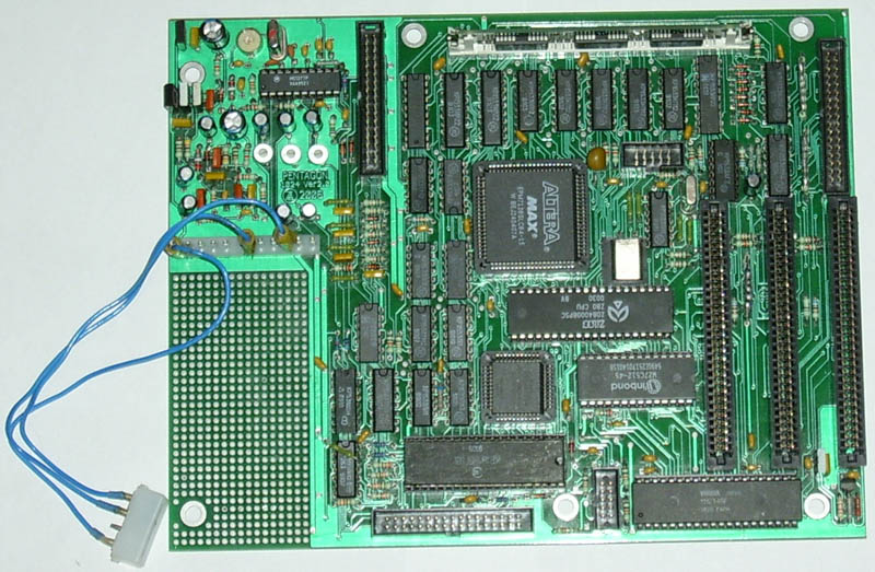 Материнская плата Pentagon1024SL v2.0